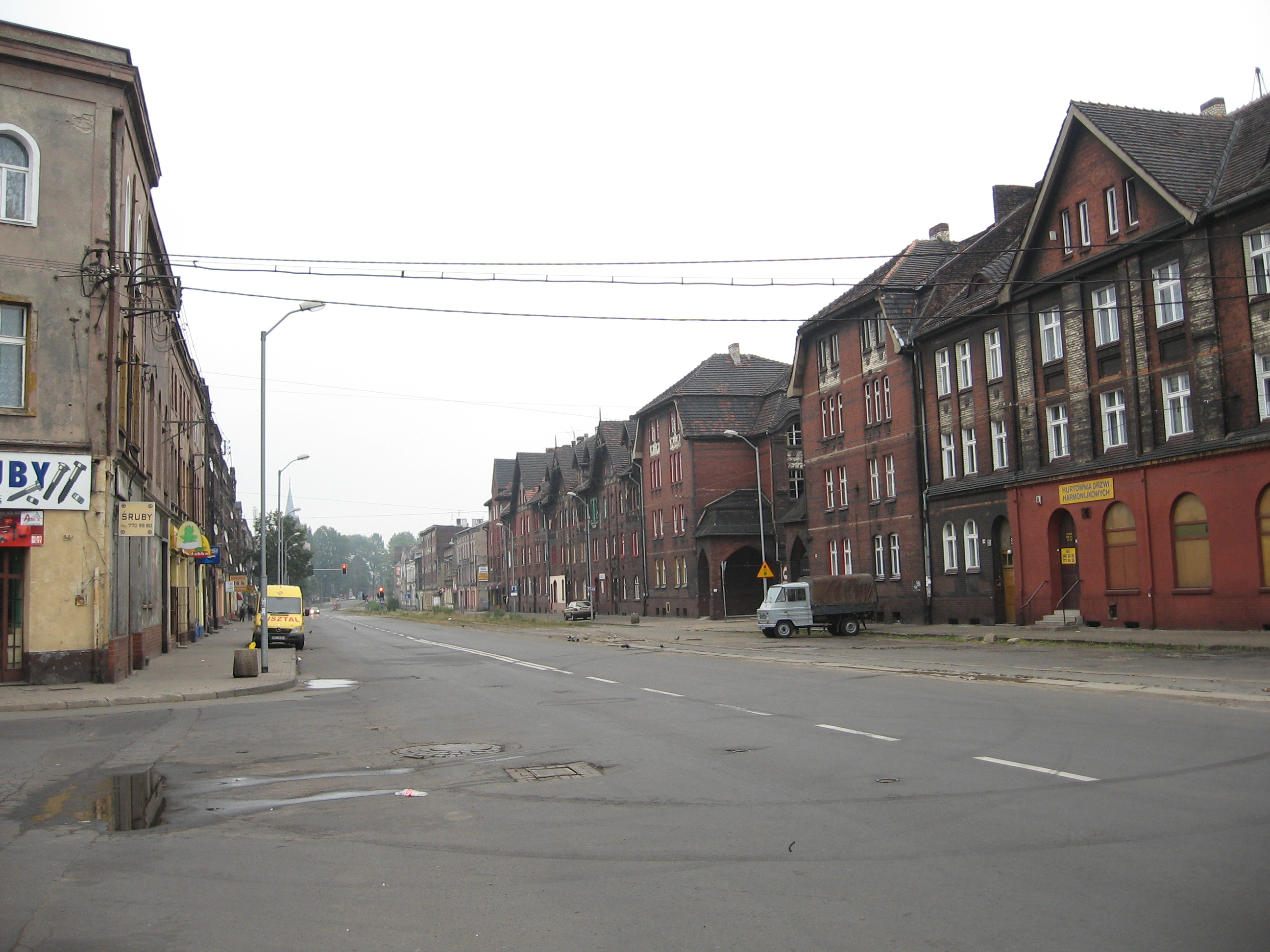 Świętochłowice, Lipiny, ul. Chorzowska